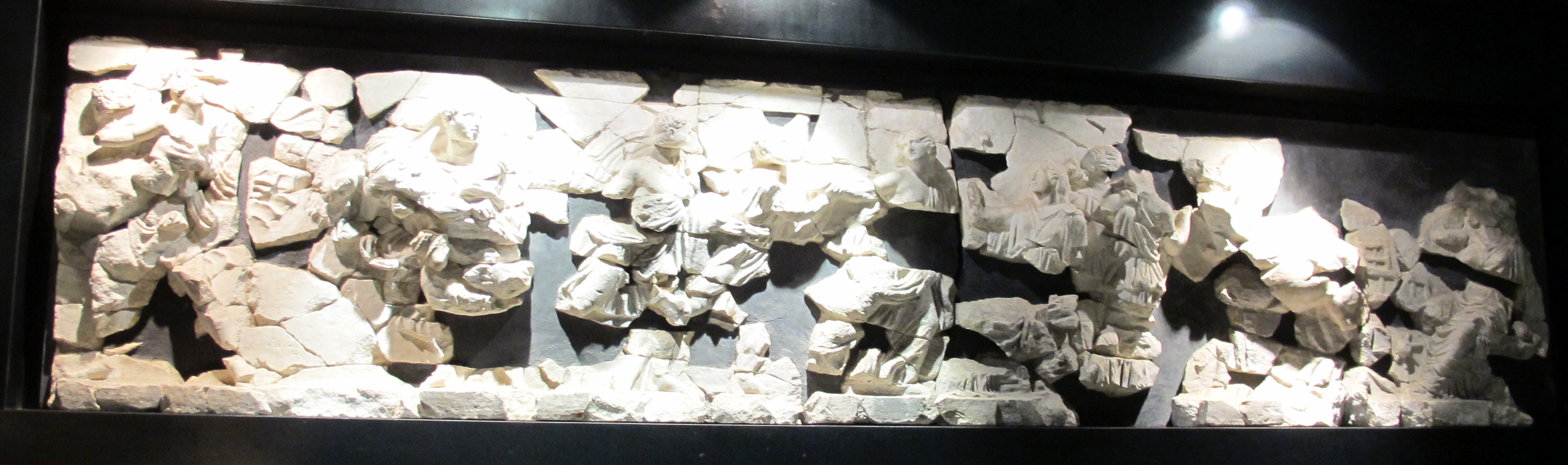 Curia Iulia - Roma